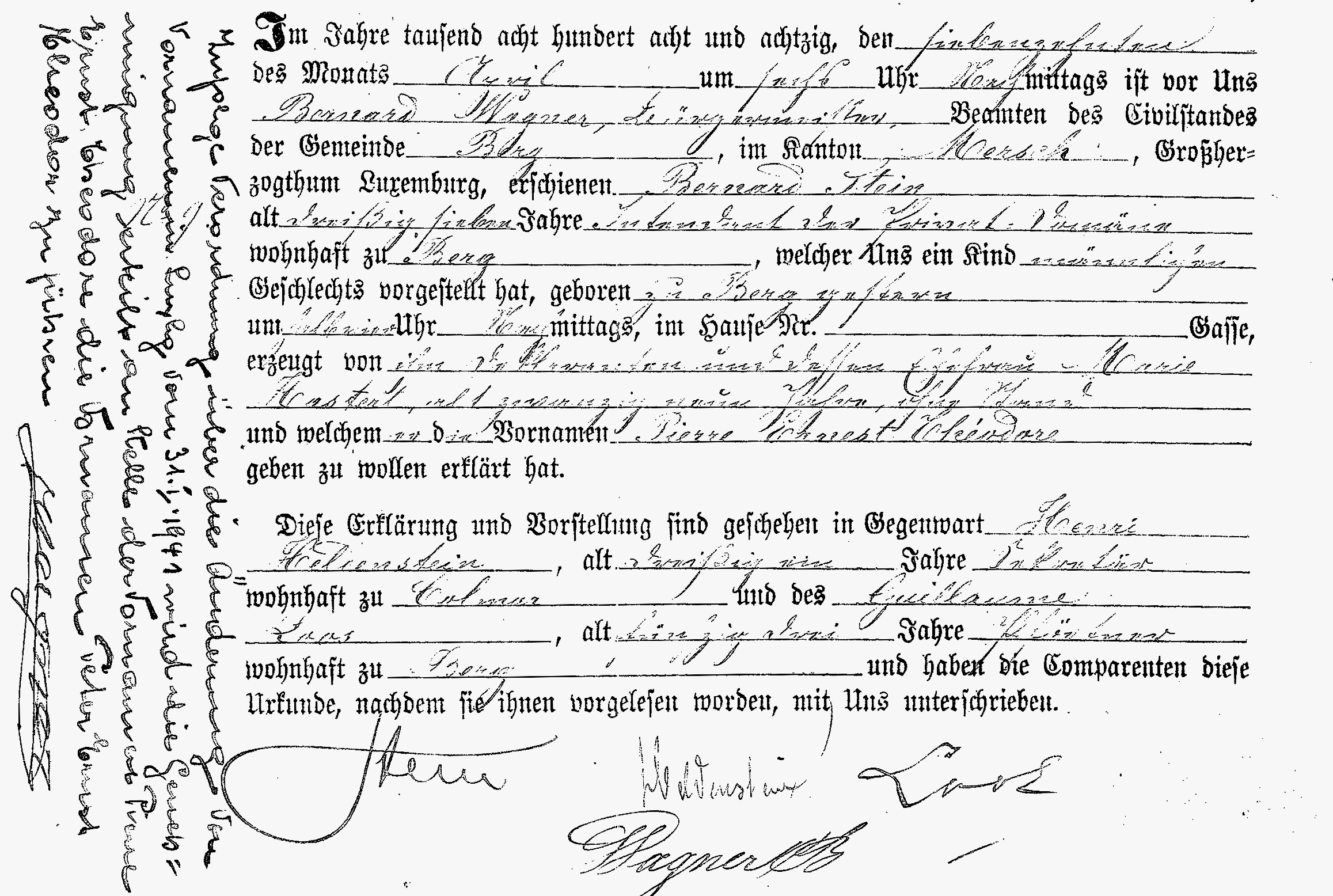 Gebuertschäi vum Putty Stein.